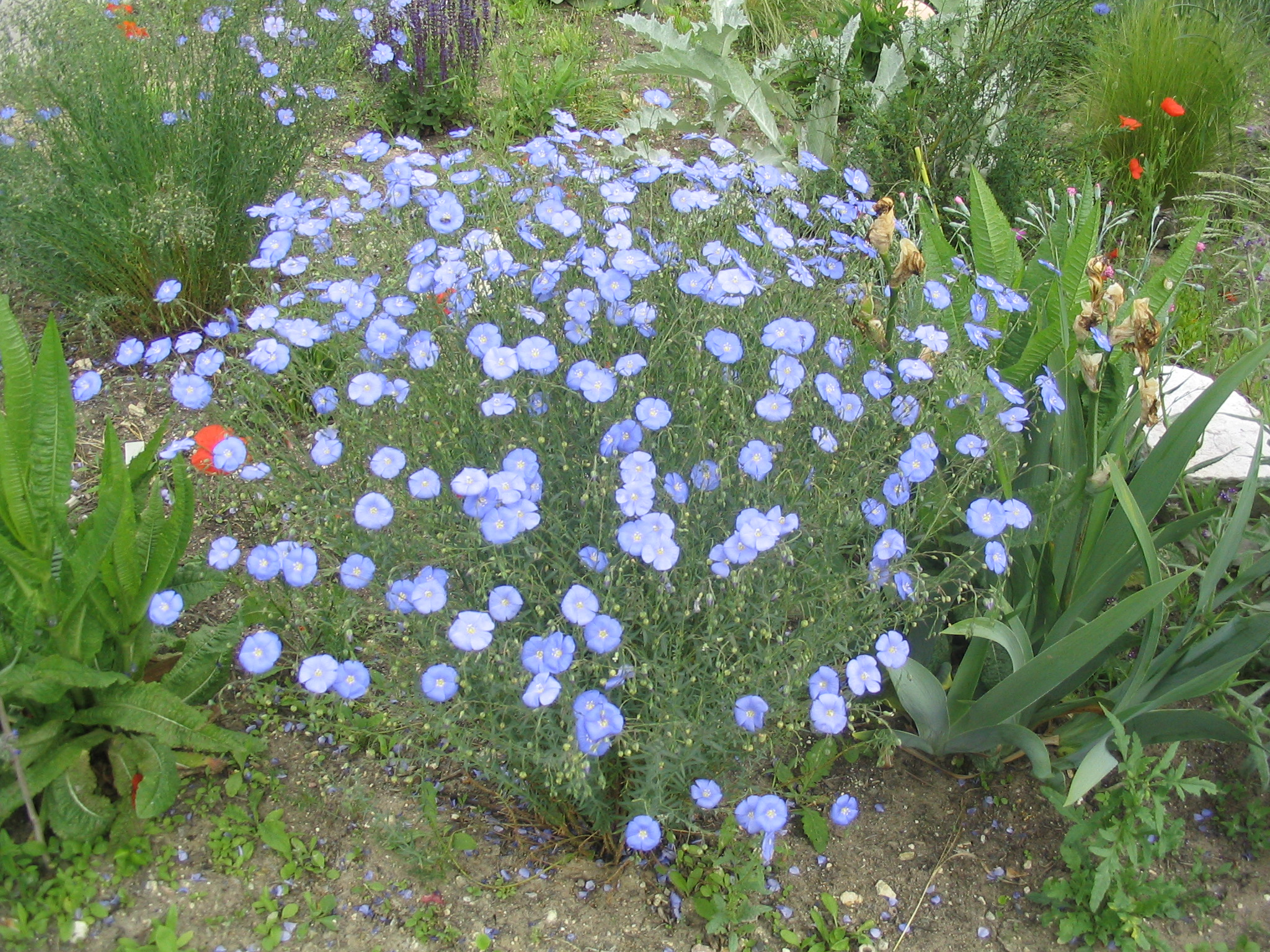 Ausdauernder Lein, Linum perenne, als Gartenpflanze, aufgenommen am 04.06.2006 von Dr. Hagen Graebner